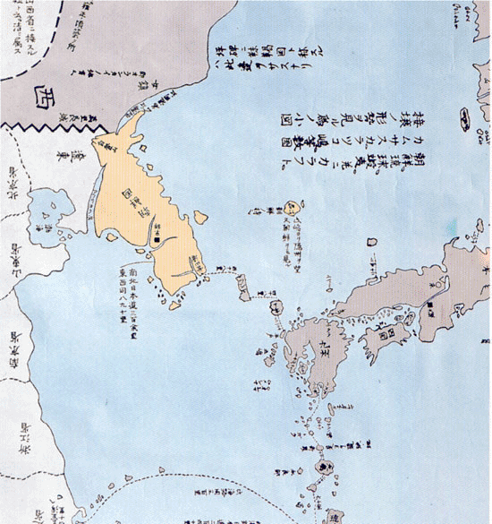 독도의 옛 지도